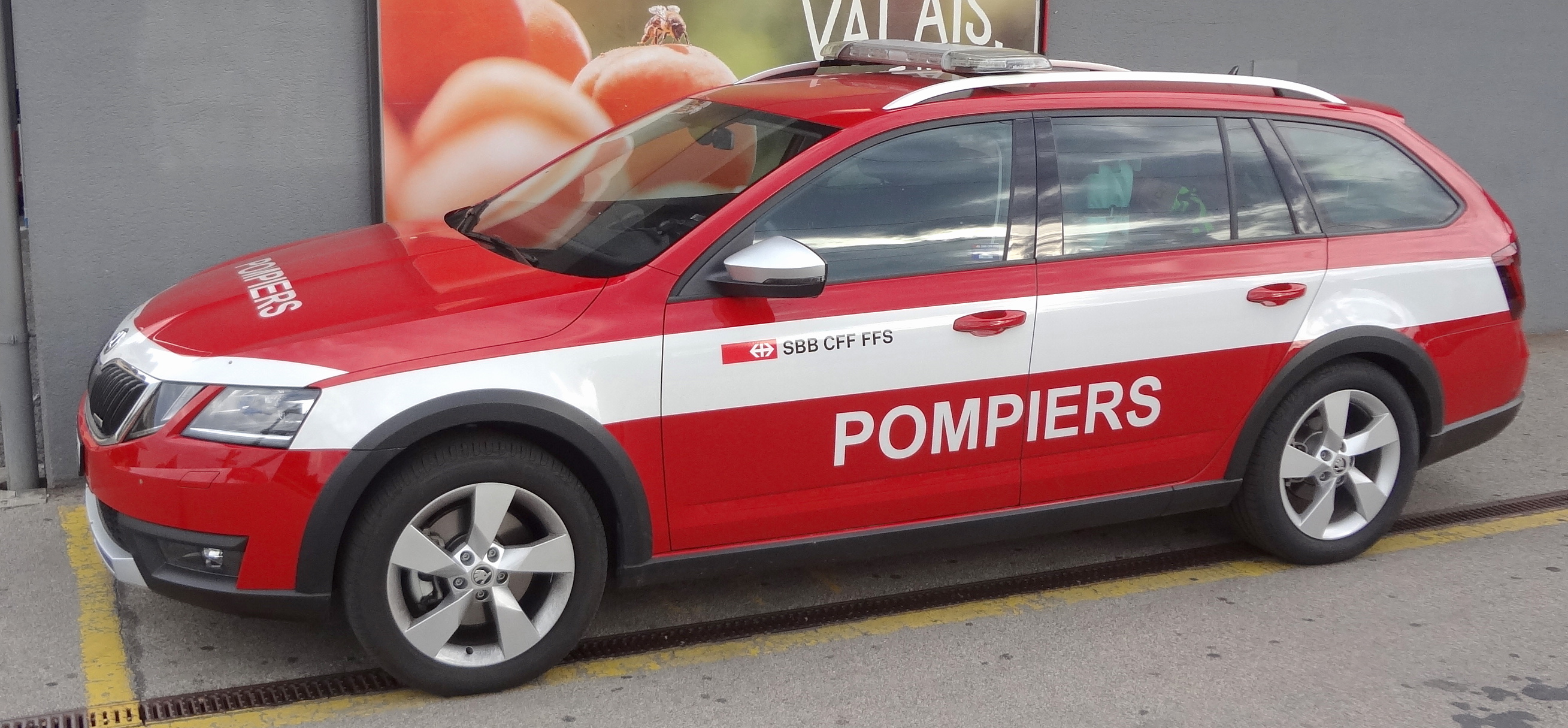 Voiture "POMPIERS" des CFF en gare de Nyon.